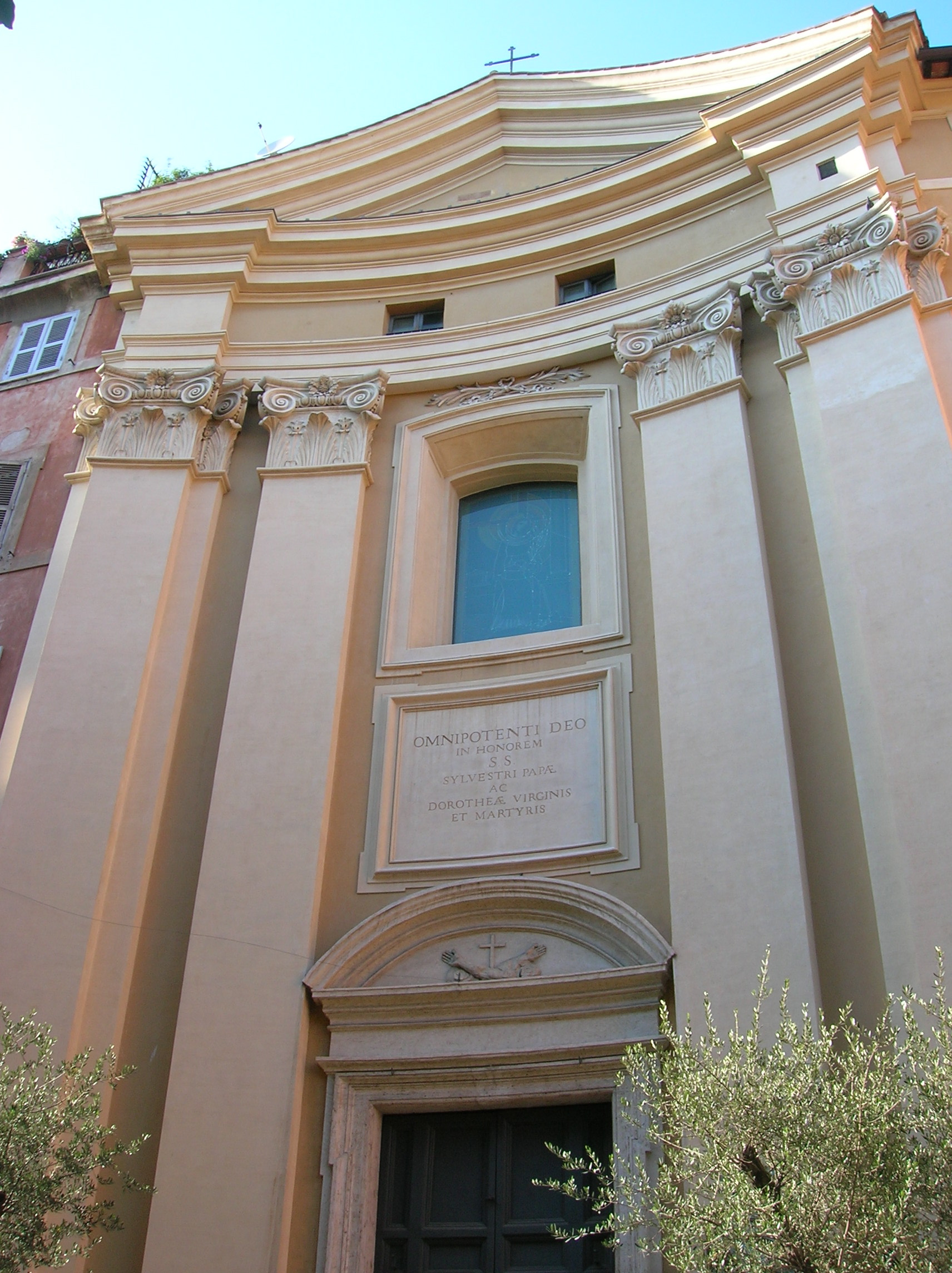 Façade de l'église Santa Dorotea dans Trastevere à Rome